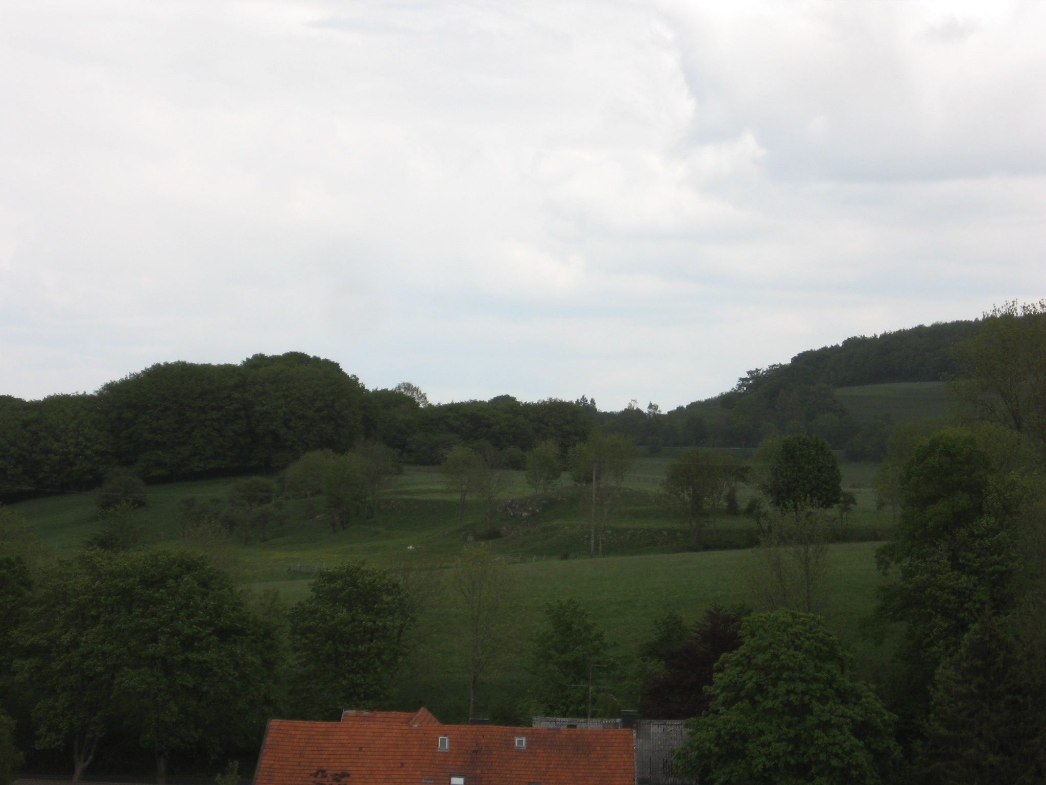 Naturschutzgebiet Brandige Mühle in Bildmitte. Im Felsbereich befinden sich Magerrasen. Unten ist das Dach von Kleinschmidts Mühle zu sehen. Waldbereich oben rechts gehört zum Naturschutzgebiet Ratmerstein.